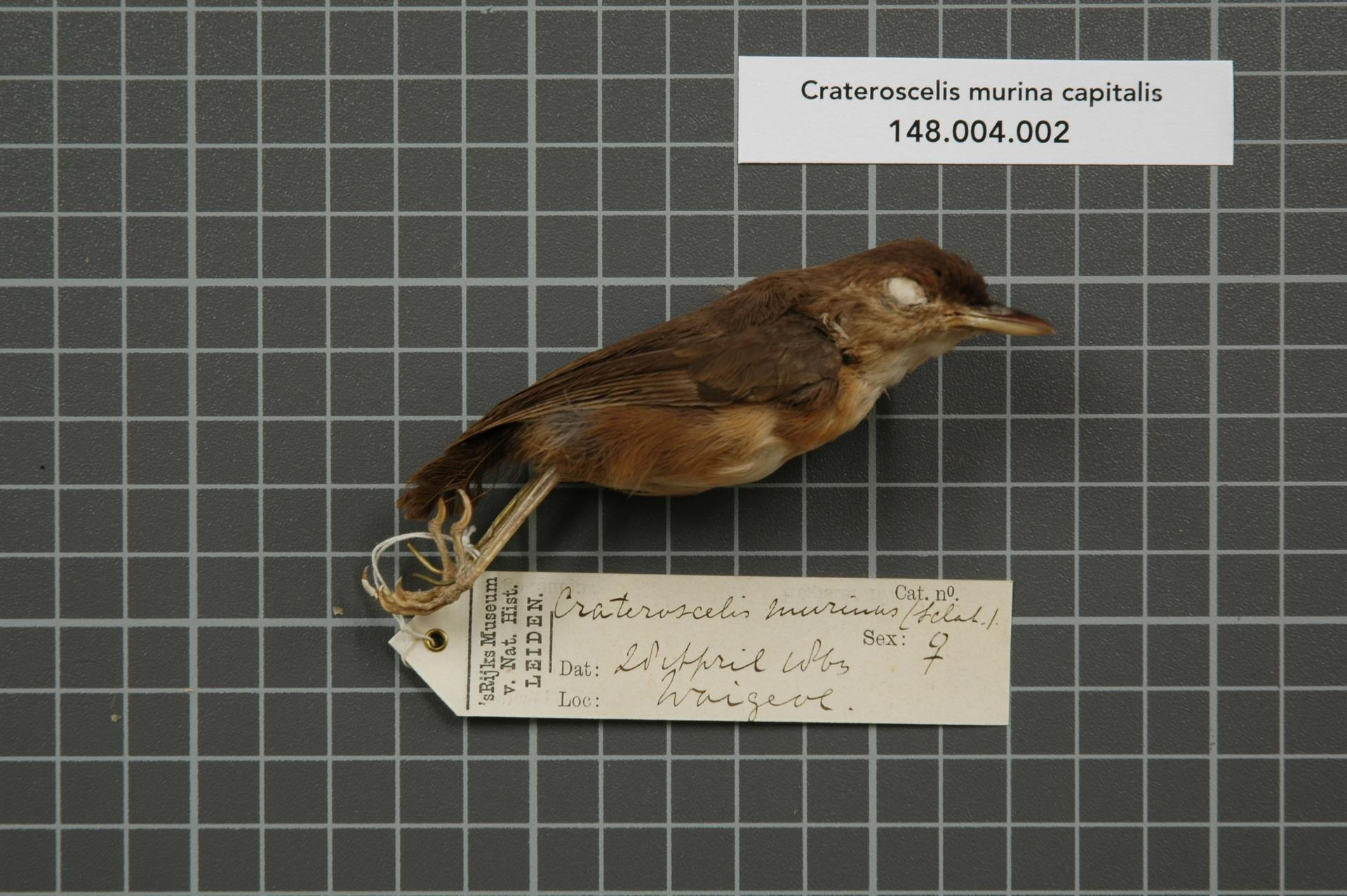 Crateroscelis murina capitalis Stresemann & Paludan, 1932